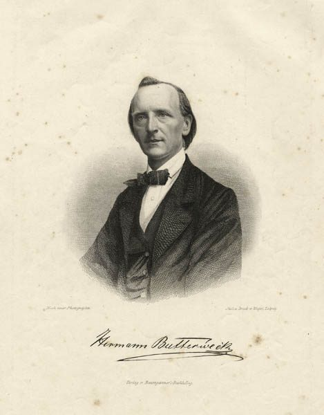 Portrait des Tänzers und Regisseurs Hermann Butterweck